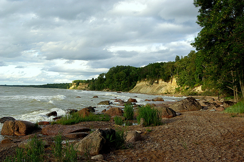 Utria rand vaatega Utria panga paljanditele.